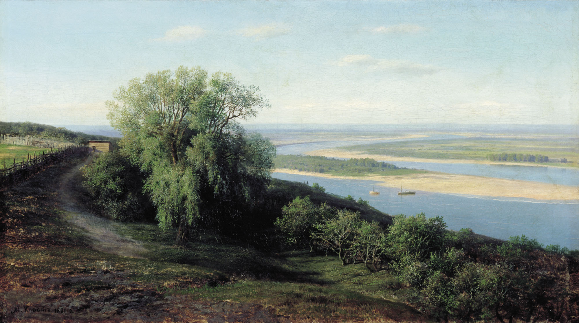 Волга под Симбирском. 1881, холст, масло, 64х115 см